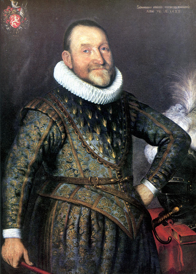 Portrait de Théodore Agrippa d’Aubigné.